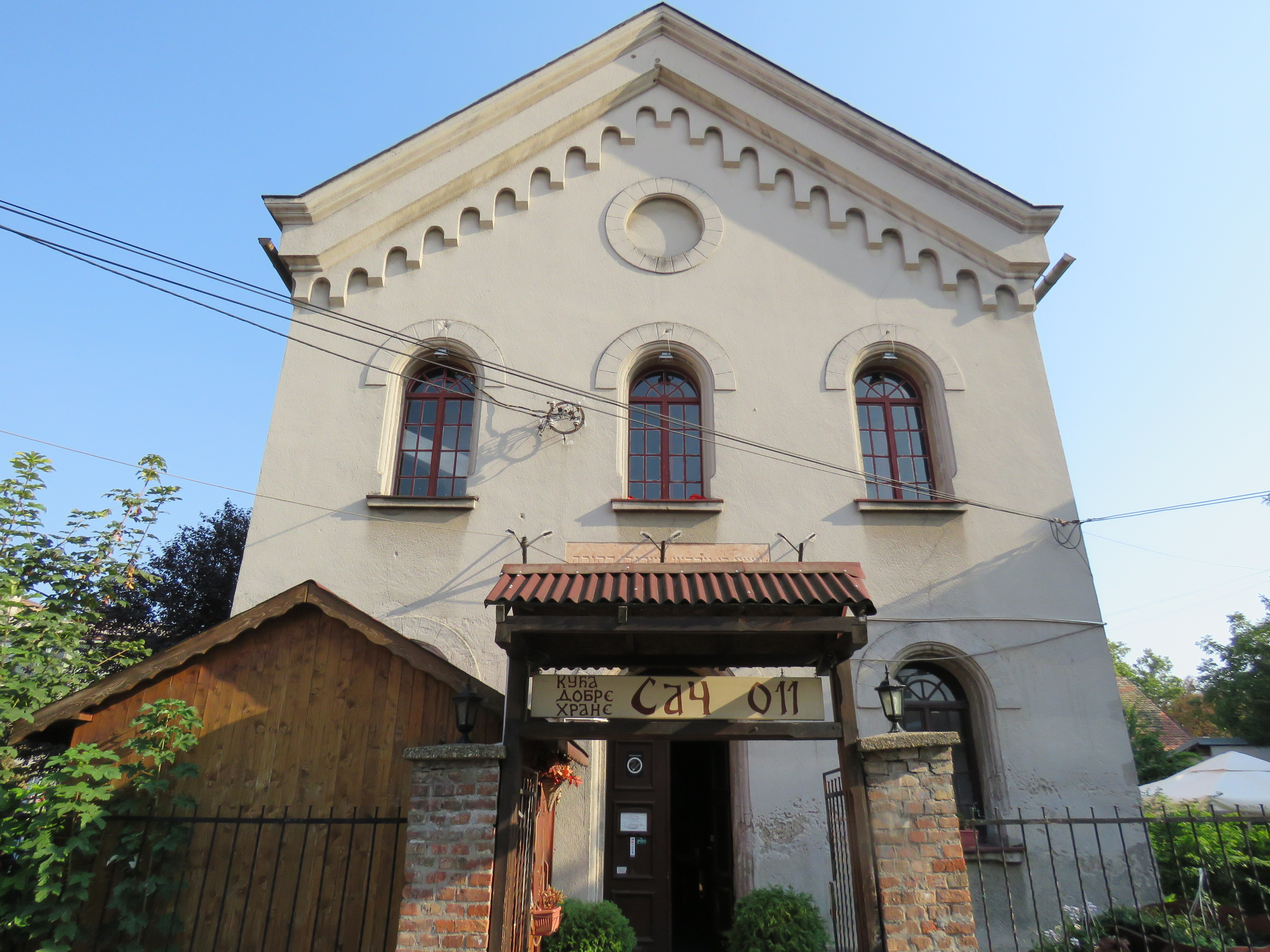 Nekadašnja sinagoga u Zemunu